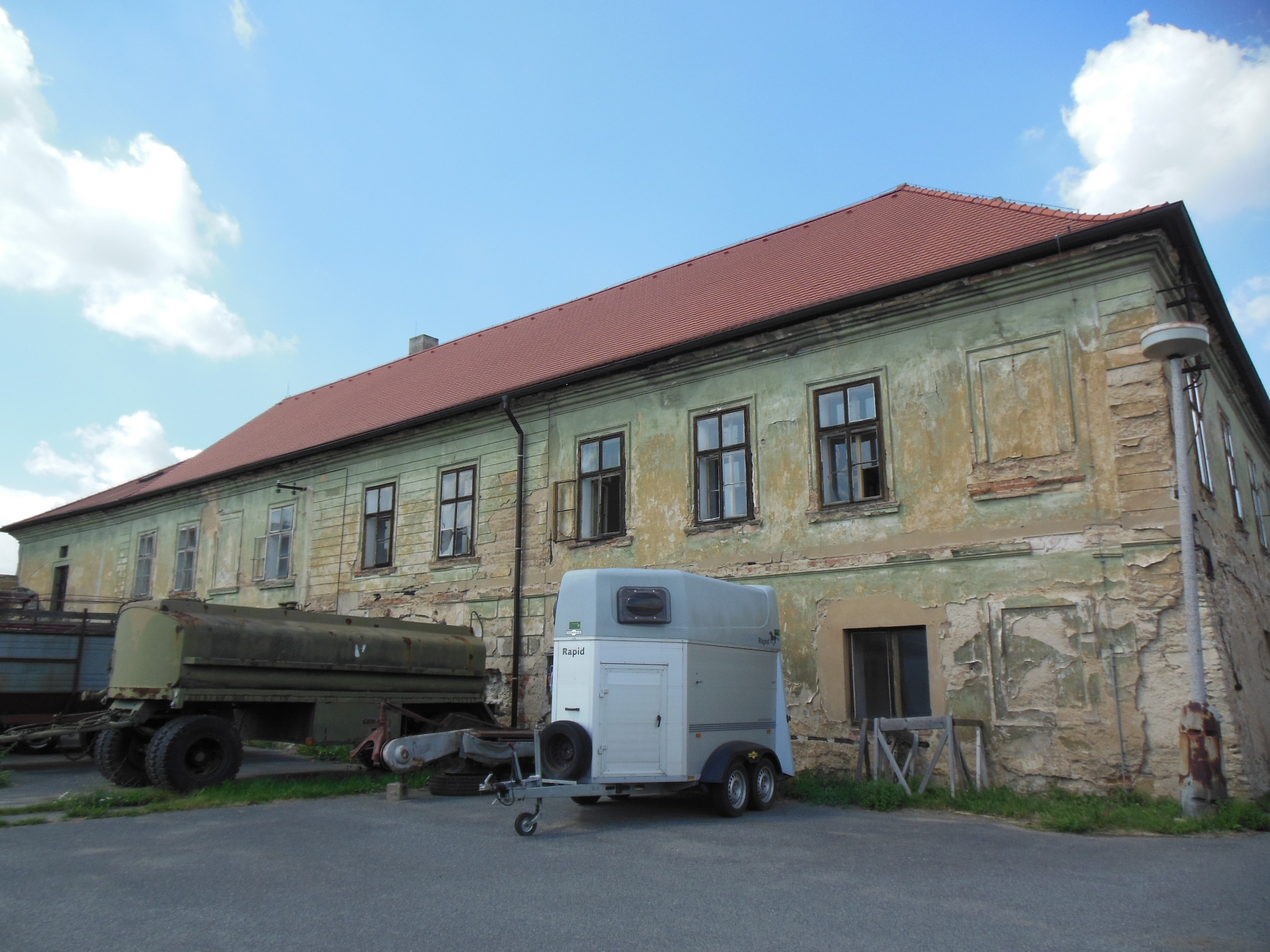 Brandejsův statek v ulici Dvorská v Praze-Suchdole.